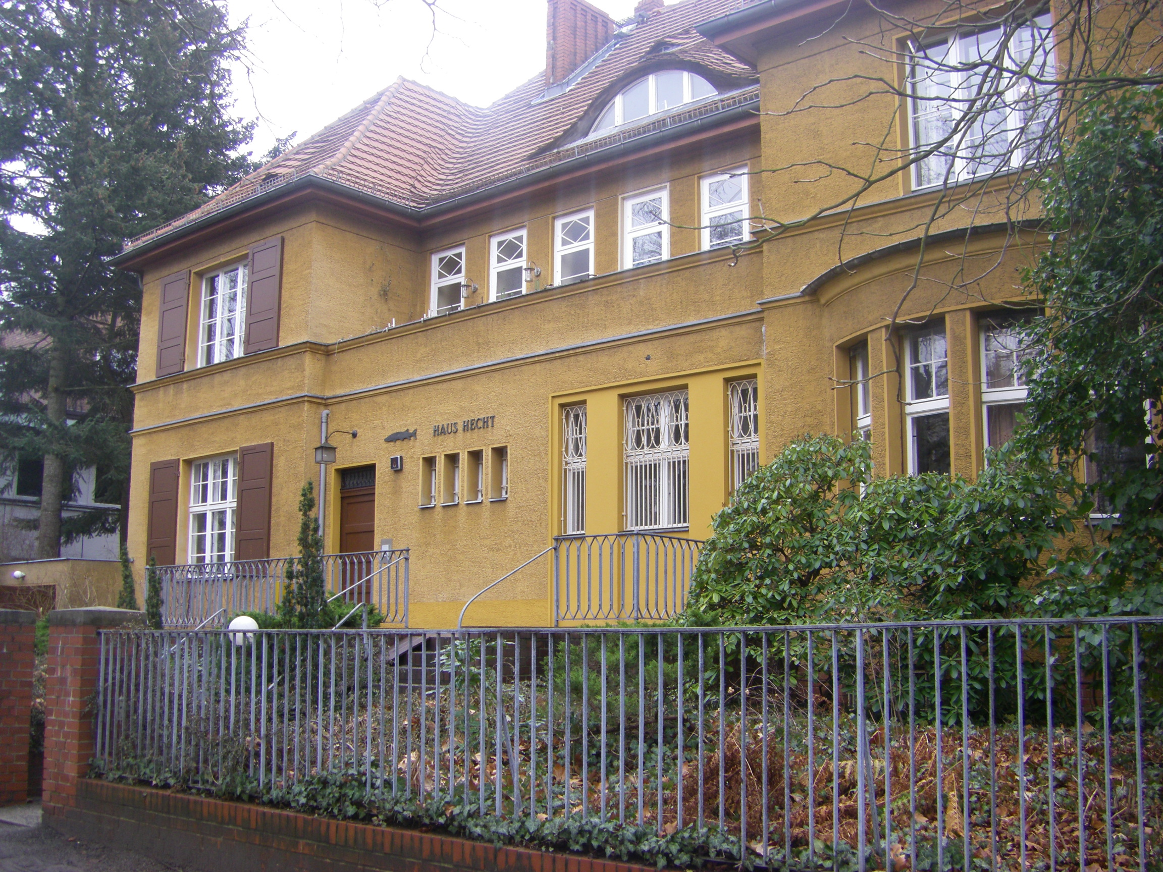 Berlin-Dahlem Arnimallee 8 Haus Hecht